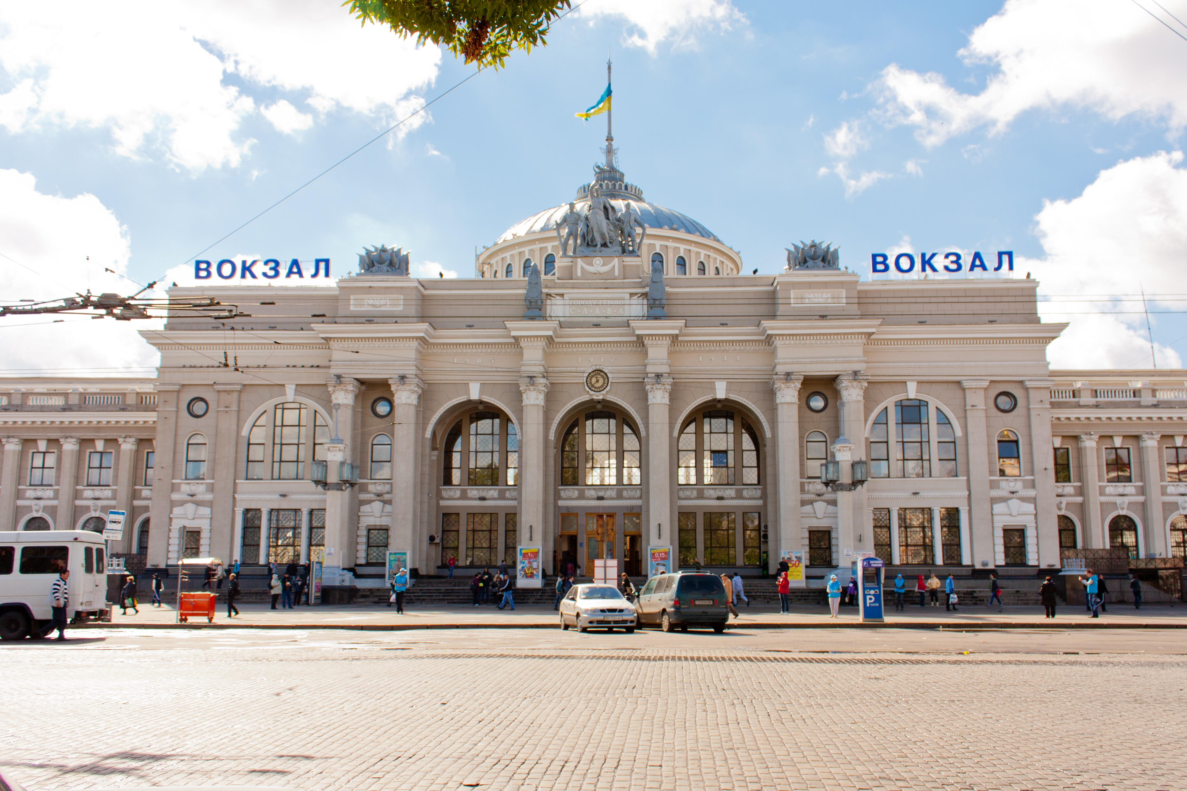 Будівля залізничного вокзалу, Одеса, Привокзальна пл.